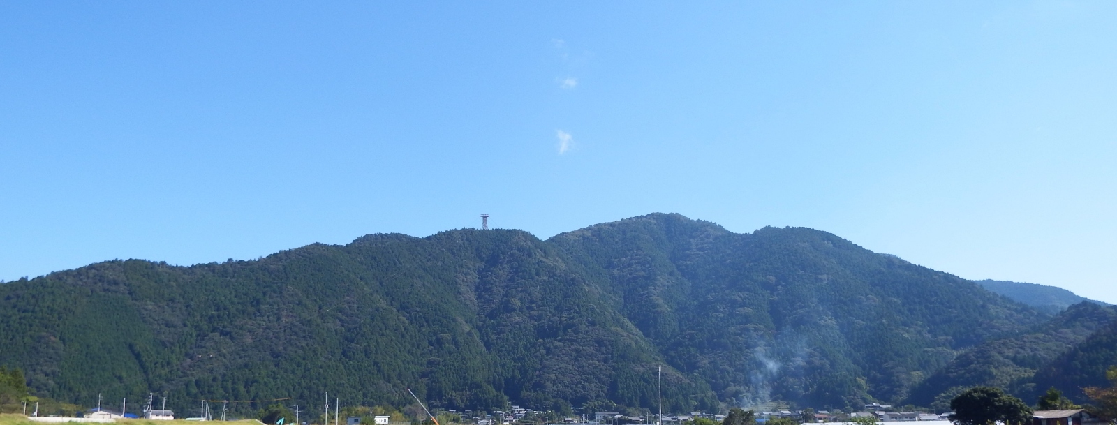 太竜寺山を南側より